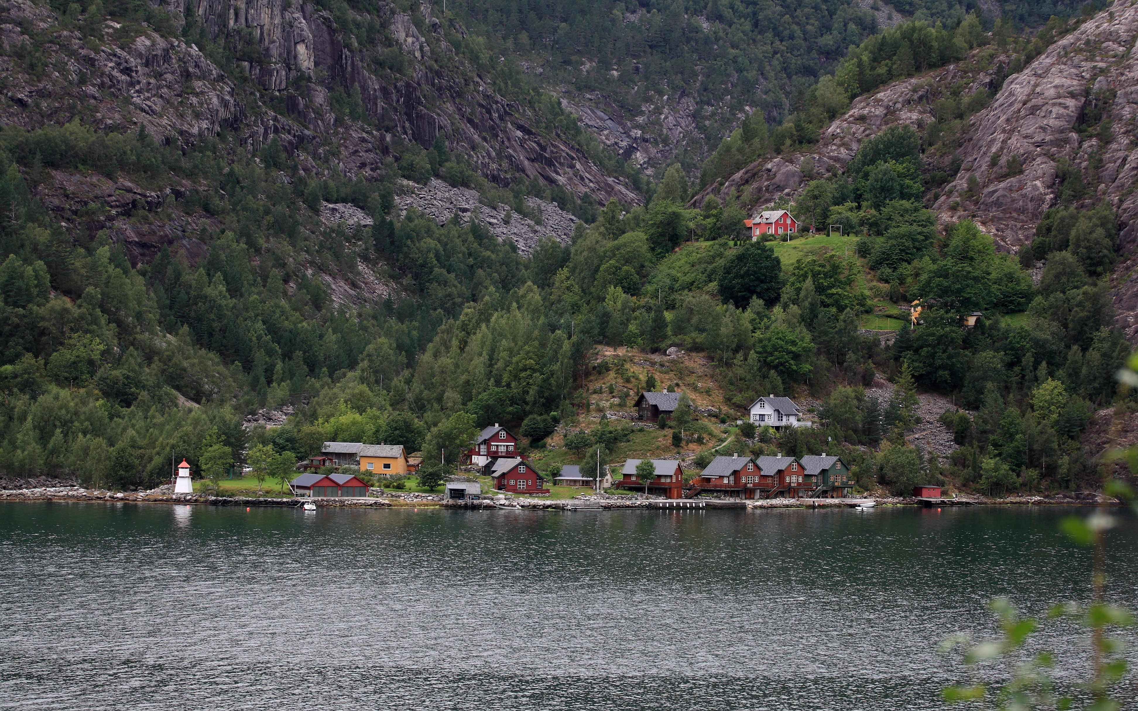 Mosnes by Åkrafjorden in Etne